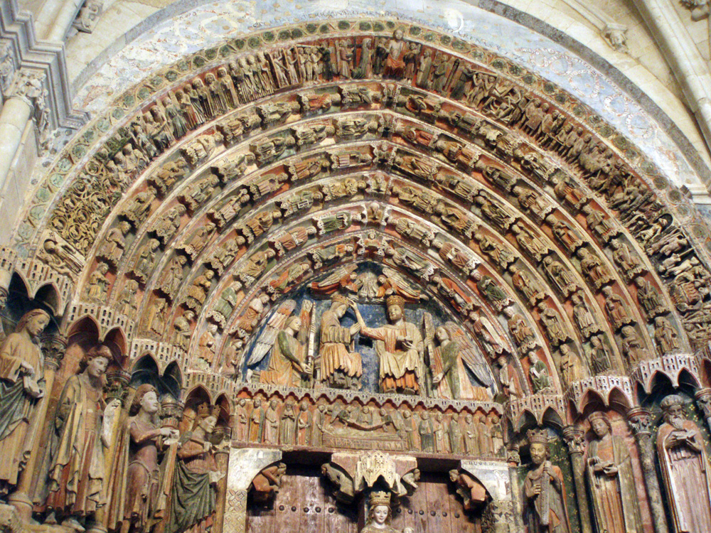 Pórtico de la Majestad, en la Colegiata de Santa María la Mayor, en Toro (Zamora)